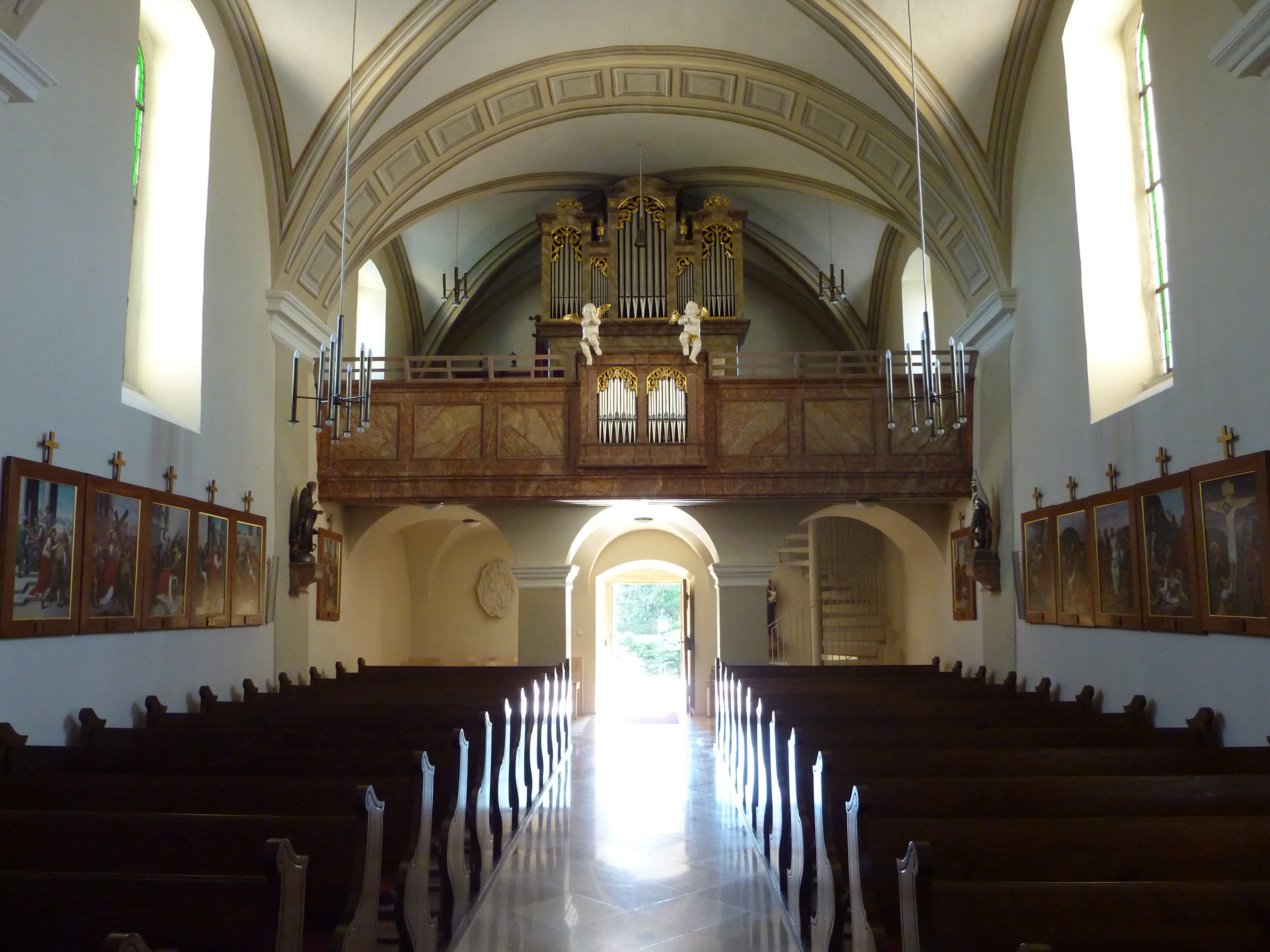 Pfarrkirche hl. Stephanus, Nappersdorf, Nappersdorf-Kammerdorf, Niederösterreich - Orgel von Franz Meinl, 1858